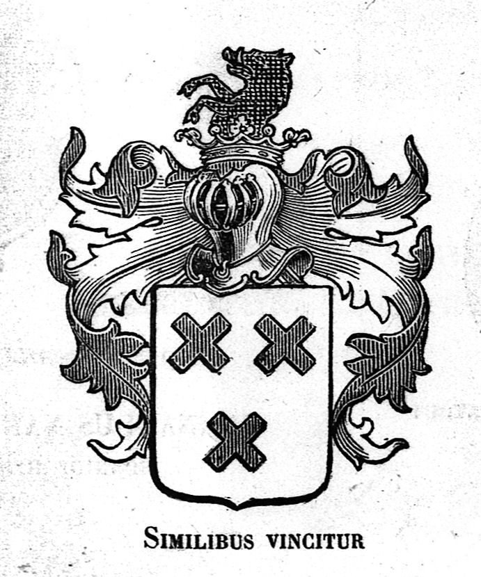 PRAENOBLIS Familia ex Belg.